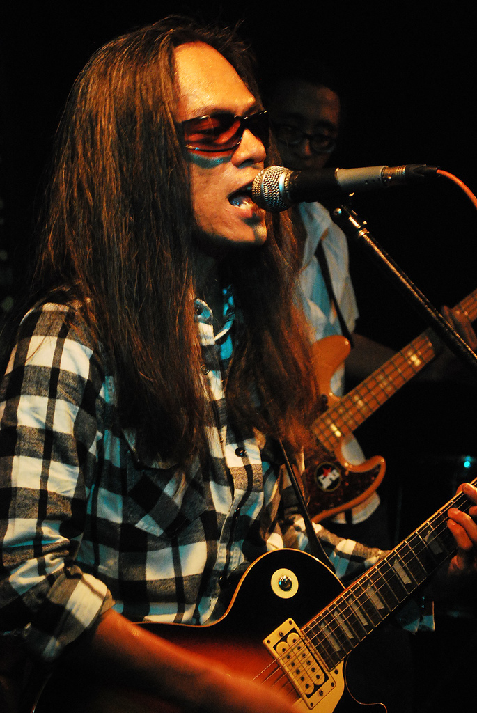 Marcus Adoro